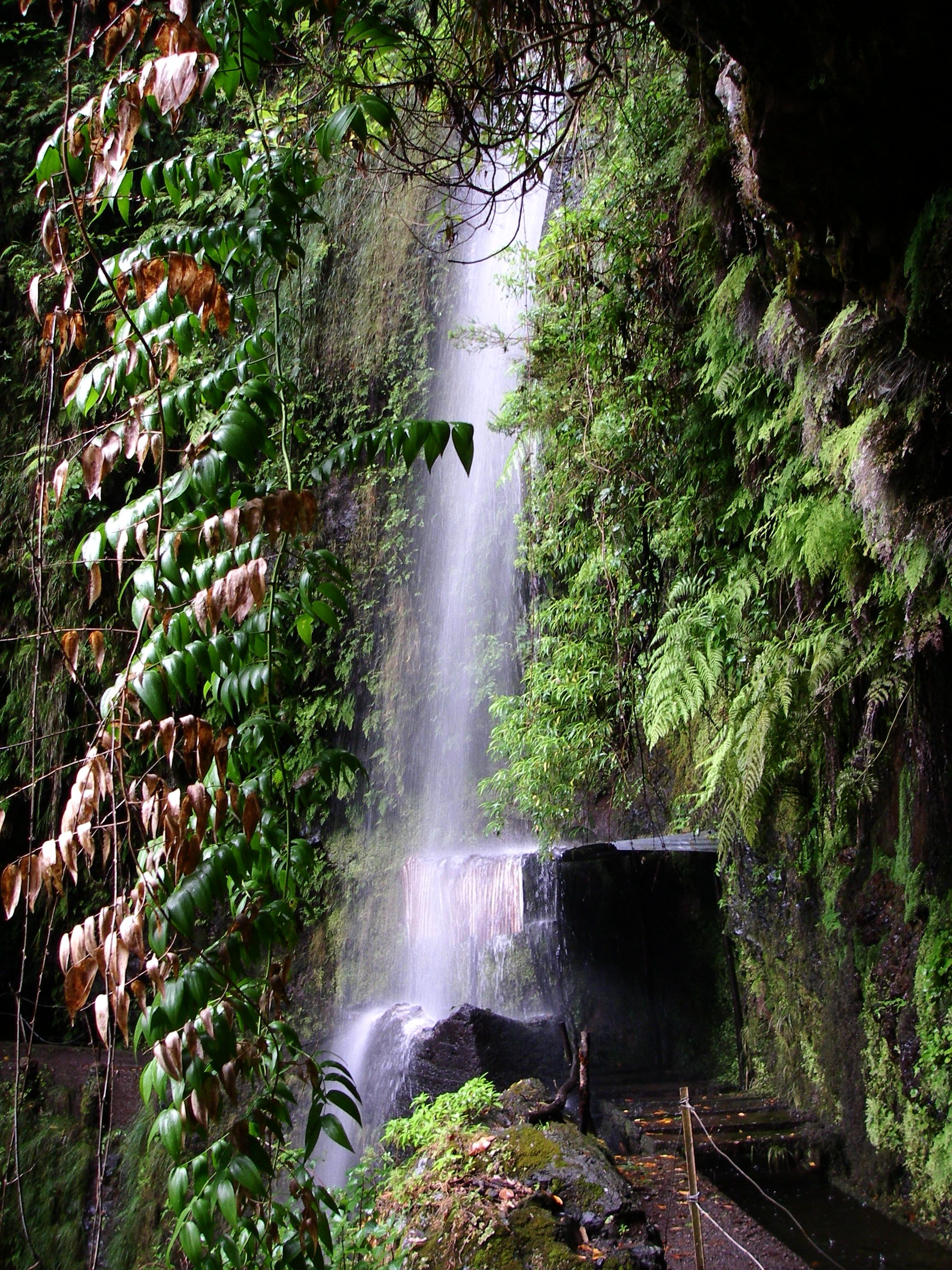 Levada da Central da Ribeira da Janela